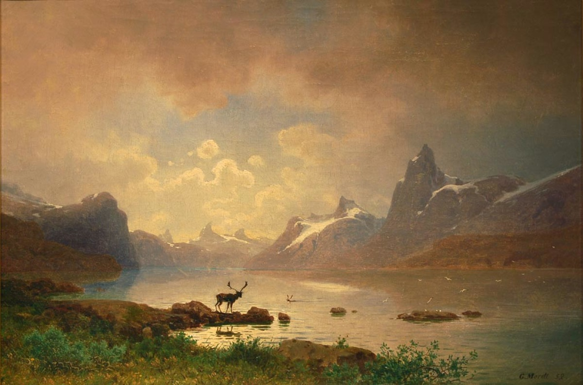 Norwegian: Rensdyr ved fjellvannPainting "Reindeer by Water" by Gustav Adolph Mordttitle QS:P1476,no:"Rensdyr ved fjellvann" label QS:Lno,"Rensdyr ved fjellvann"